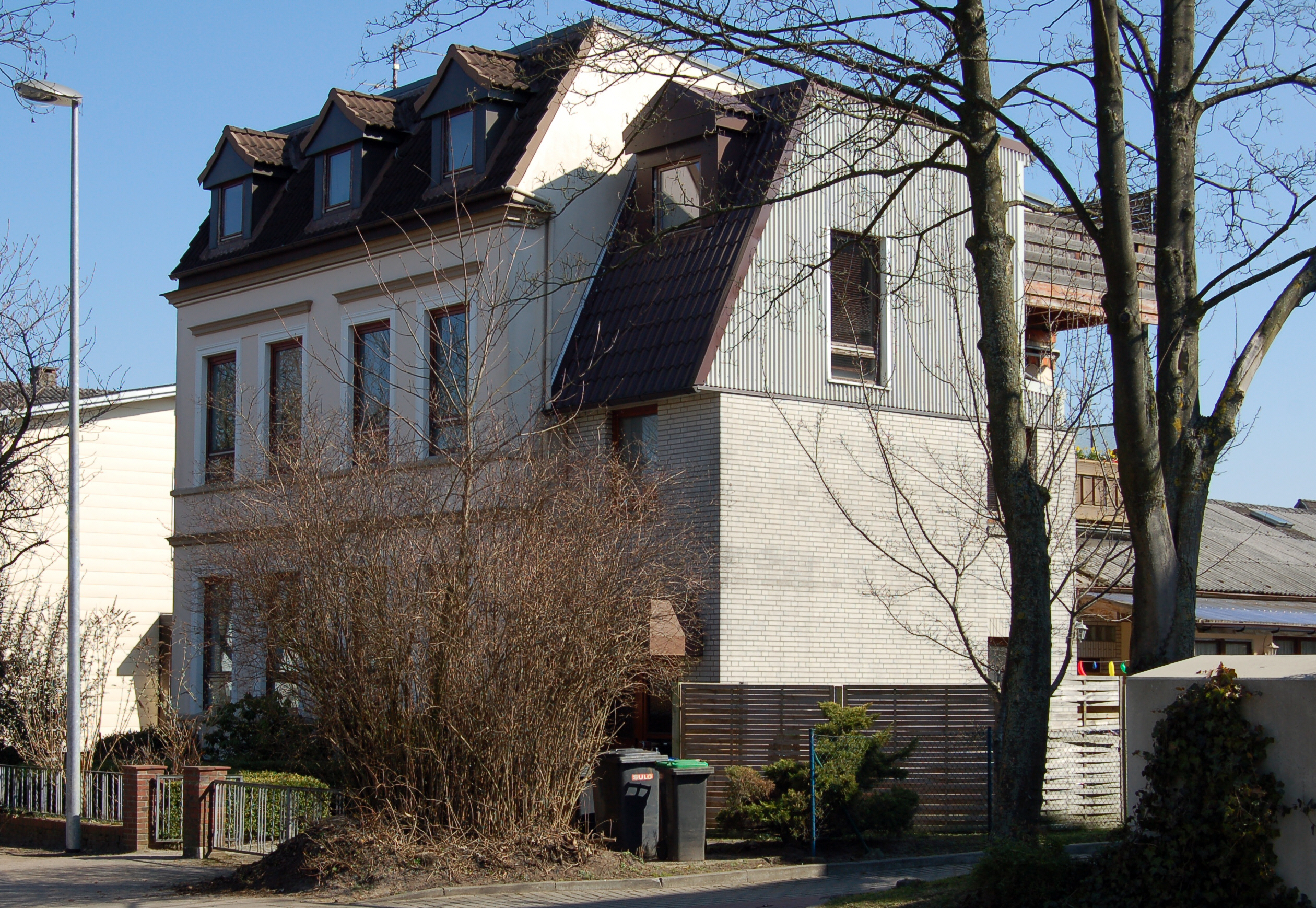 Das Haus Ollnsstraße 153, Wohnort der Mörderin Ruth Blaue. In Dachgeschoss des Hauses brache sie ihren Mann John Blaue um. Das Haus an der Stör aus dem Jahre 1963 ist einer der bekanntesten und berühmtesten Kriminalfilme aus der Reihe Stahlnetz, die zwischen 1958 und 1968 vom NDR unter der Regie von Jürgen Roland produziert wurden. Wie alle Folgen der Serie beruhte auch dieser Film auf einer wahren Begebenheit, bei der nur Ort und Personen der Handlung geändert wurden. Der Originalfall war hier der Fall Ruth Blaue. Die Erstausstrahlung des spannend erzählten Films fand am 26. Mai 1963 in der ARD statt und wurde wie die meisten Filme dieser Reihe zu einem Straßenfeger.